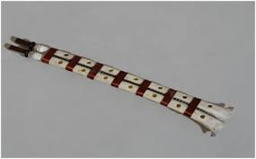 کوردی: قوشمە سازێکی ناوچەی باکووری خۆراسانە